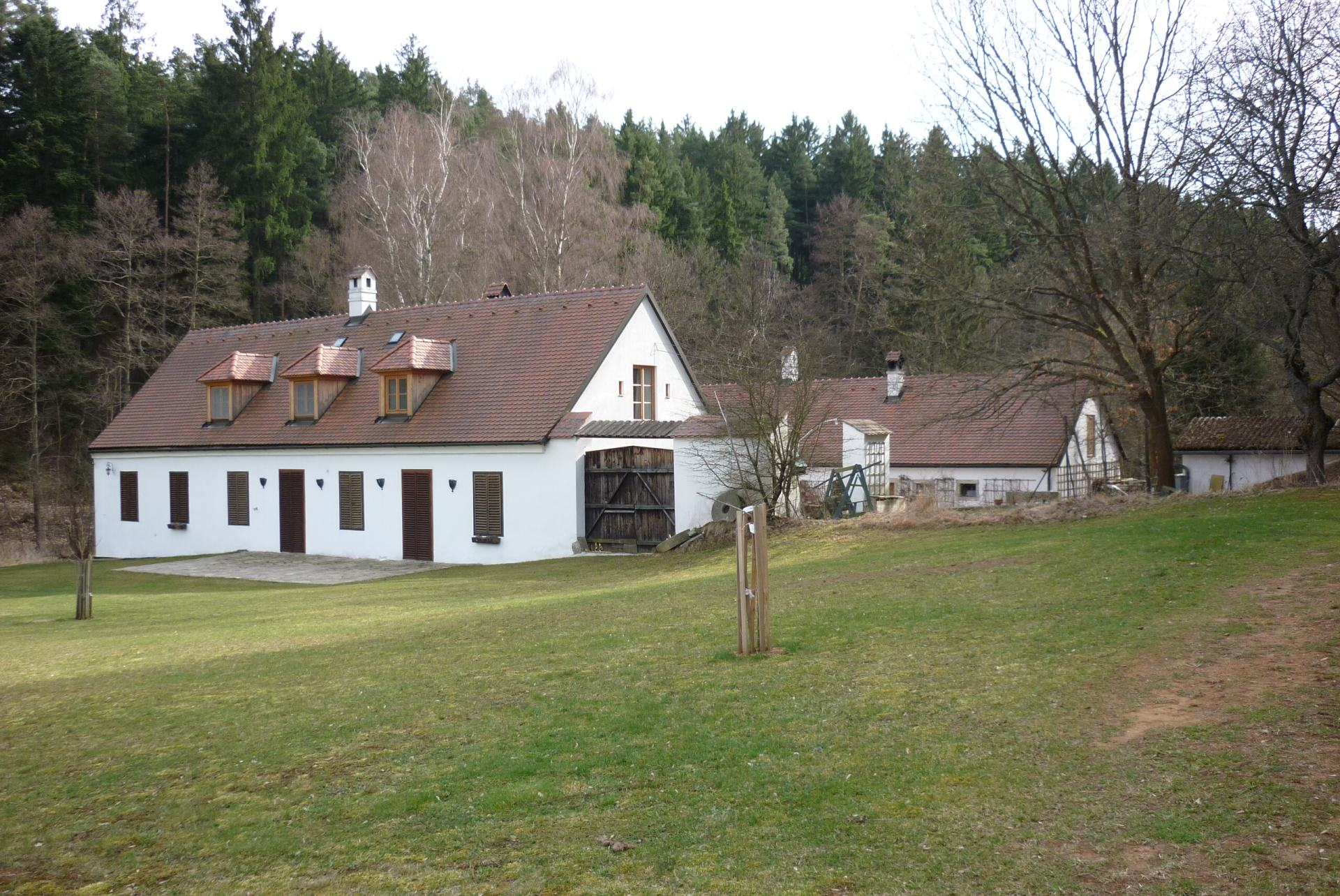 Mlýn na Slavonickém potoce u rakouské obce Fratres po překročení státní hranice